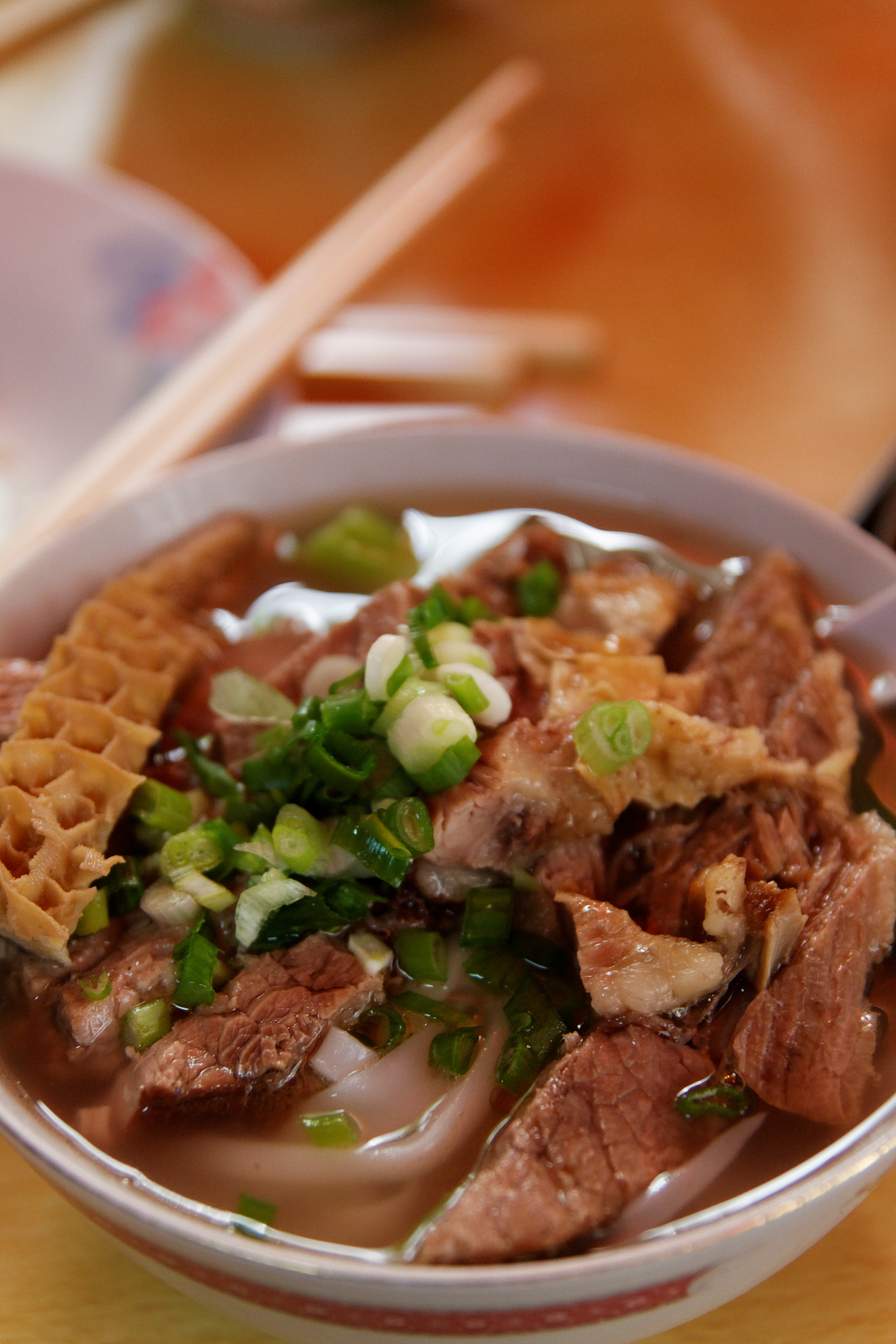 Beef brisket rice noodle in Ying Kee Noodle Shop, Hong Kong